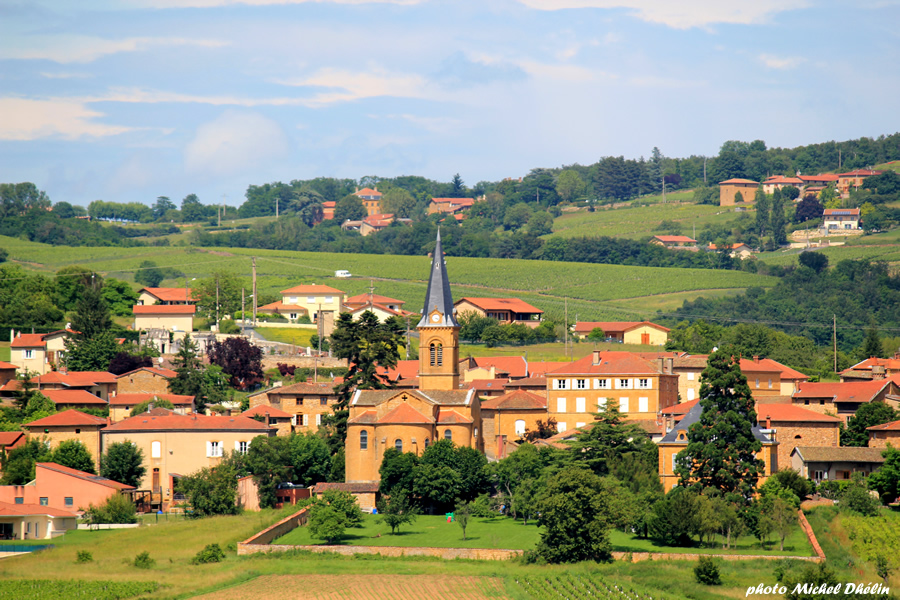 Vue du bourg de Légny au téléobjectif depuis le hameau de Billy situé au sud-ouest.